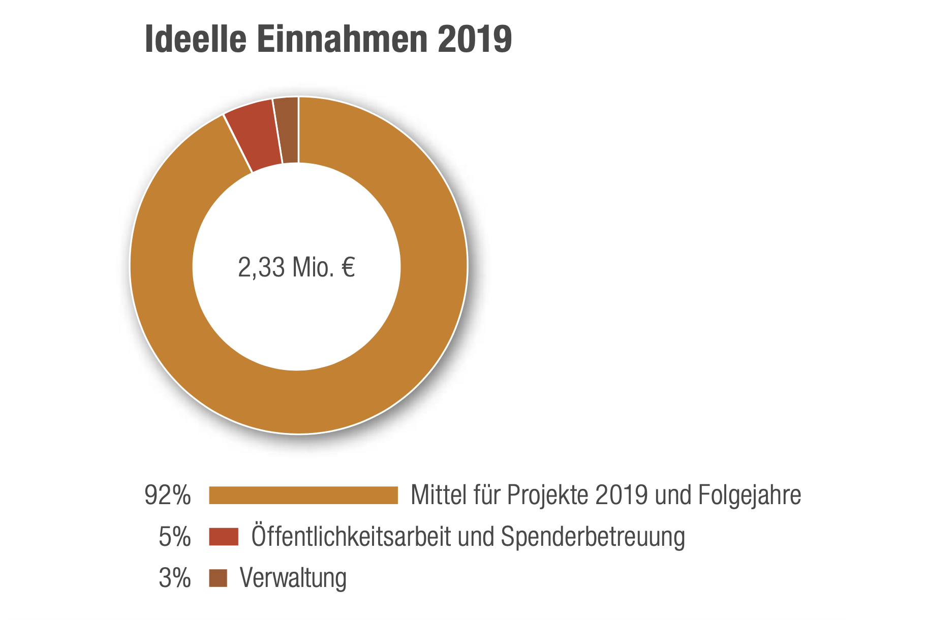 Ideelle Einnahmen 2019 der Stiftung Childaid Network